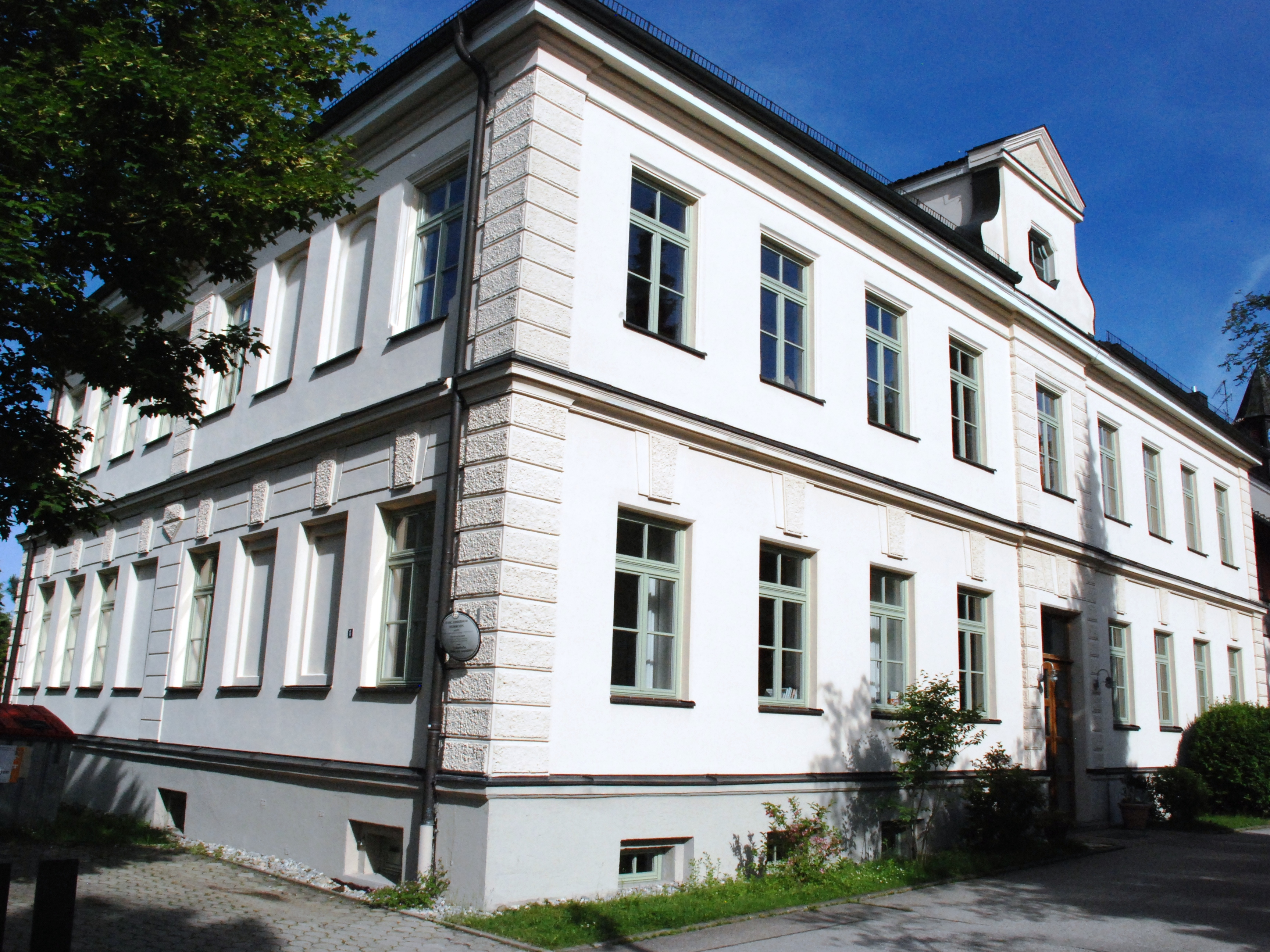 Denkmalgeschütztes Kinderheim der Inneren Mission in Feldkirchen, Landkreis München, Hohenlindner Straße 8